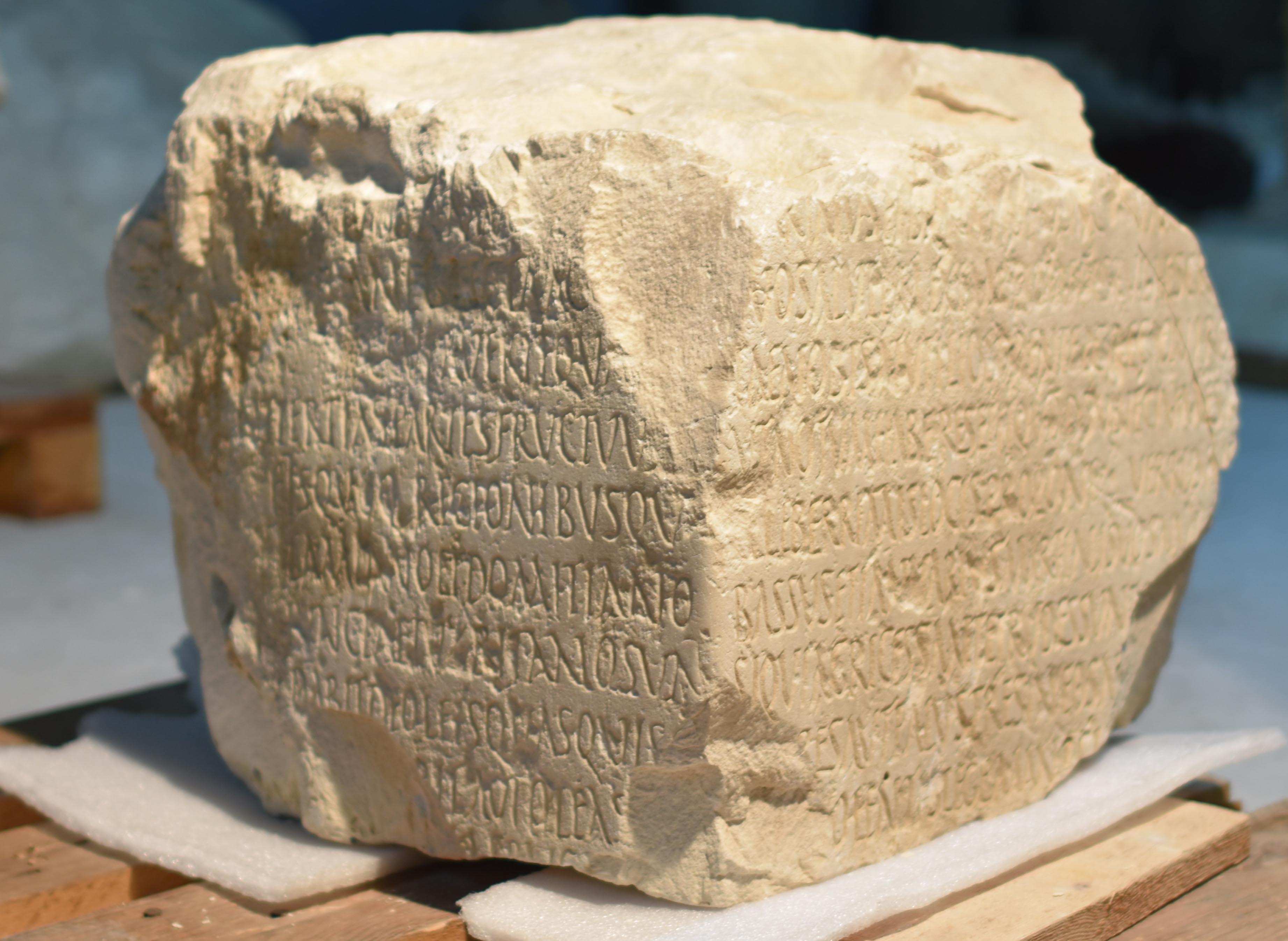 Cares 4 i 1 del bloc fragmentari d'Aïn Jammala